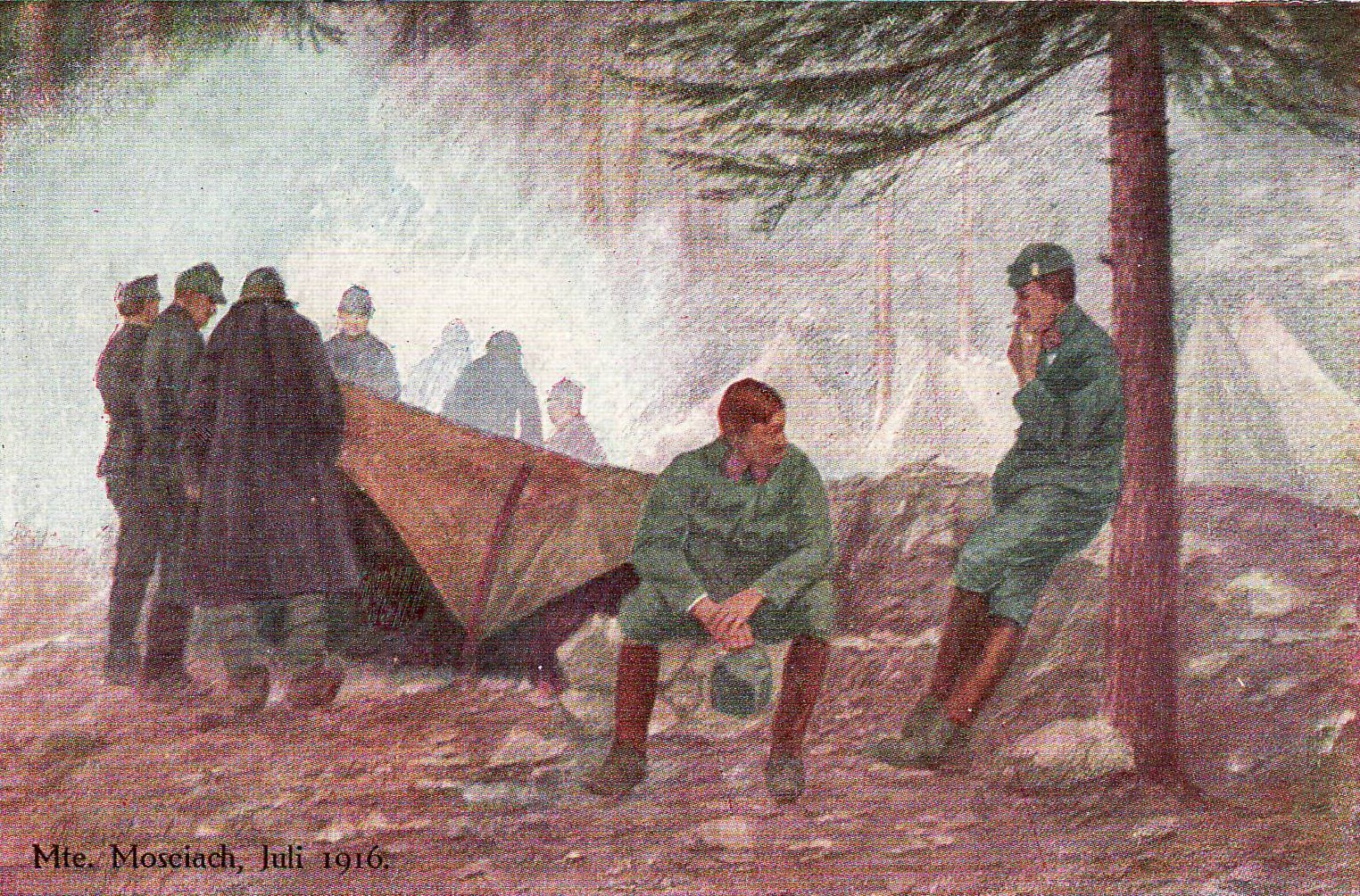 AK kuk Infanterieregiment Nr. 73 bei der Erstürmung des Monte Mosciach im Mai 1916